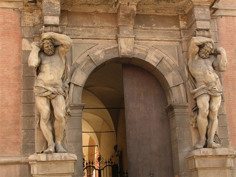 Sculpture of Palazzo Davia Bargellini in Bologna. Picture by Paolo Carboni